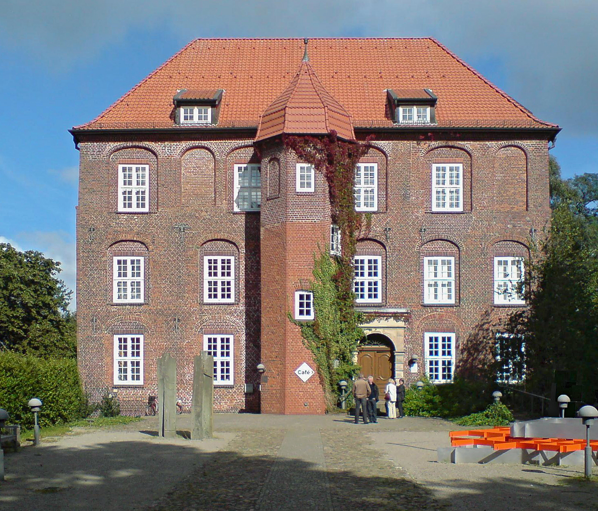 = Schloss Agathenburg, Hof Urheber = PodracerHH 21:54, 29. Mai 2007 (CEST)